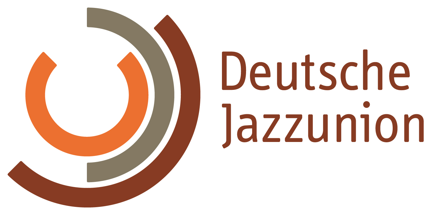 Logo der Deutschen Jazzunion seit 2019